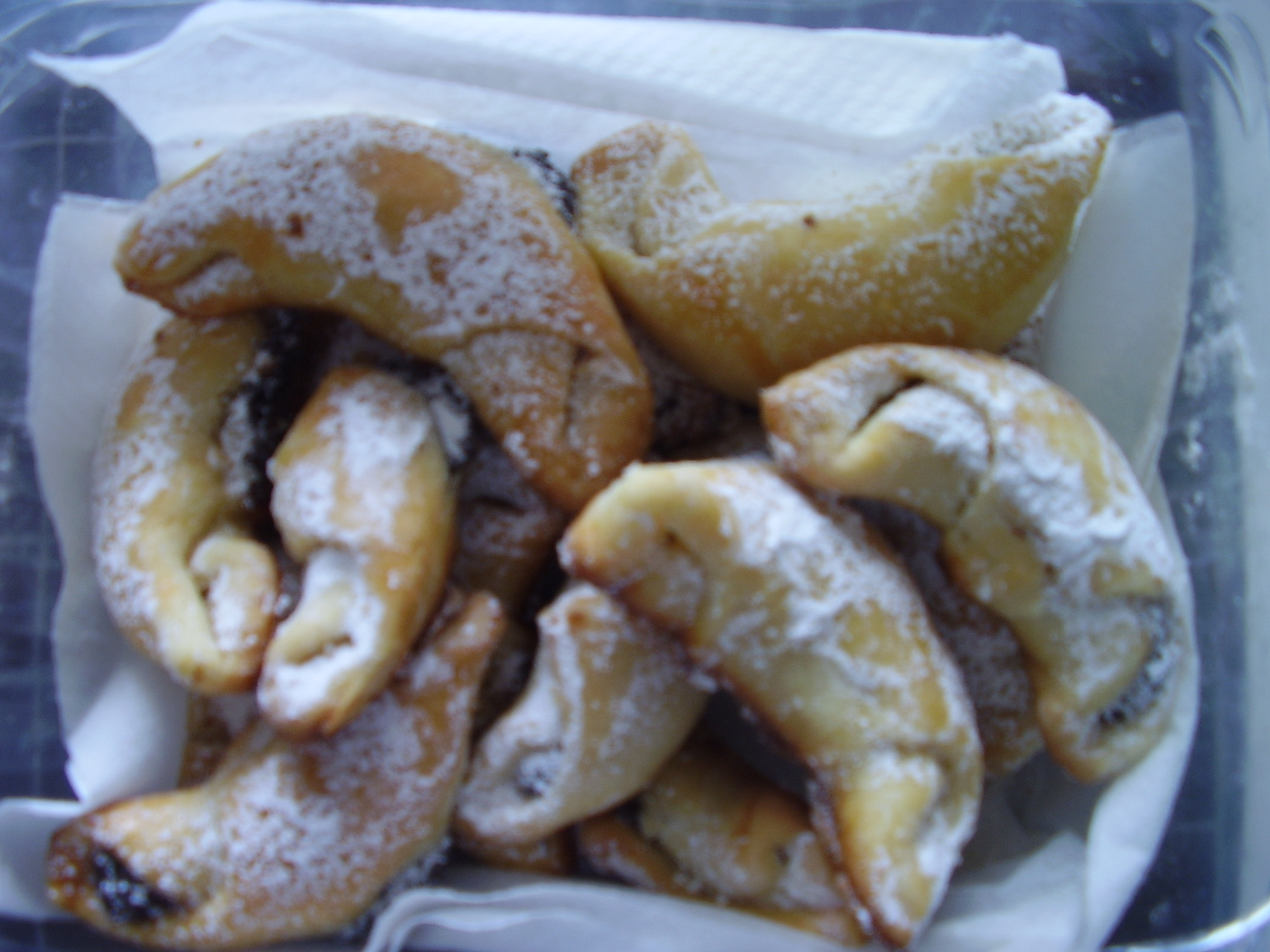 Bratislava